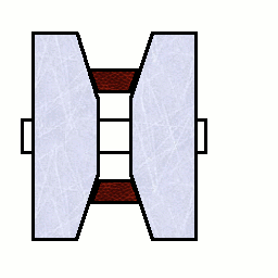 Variomatic, riemen laag.